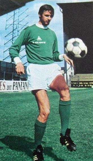 Christian Synaeghel en 1971, 'Ageducatifs Football en Action 1971 - 1972', Panini figurina n°265.